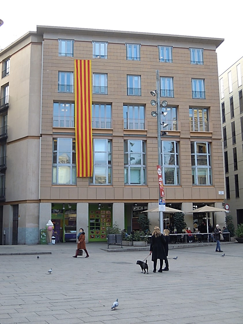 façana seu de la Comissió Jurídica Assessora